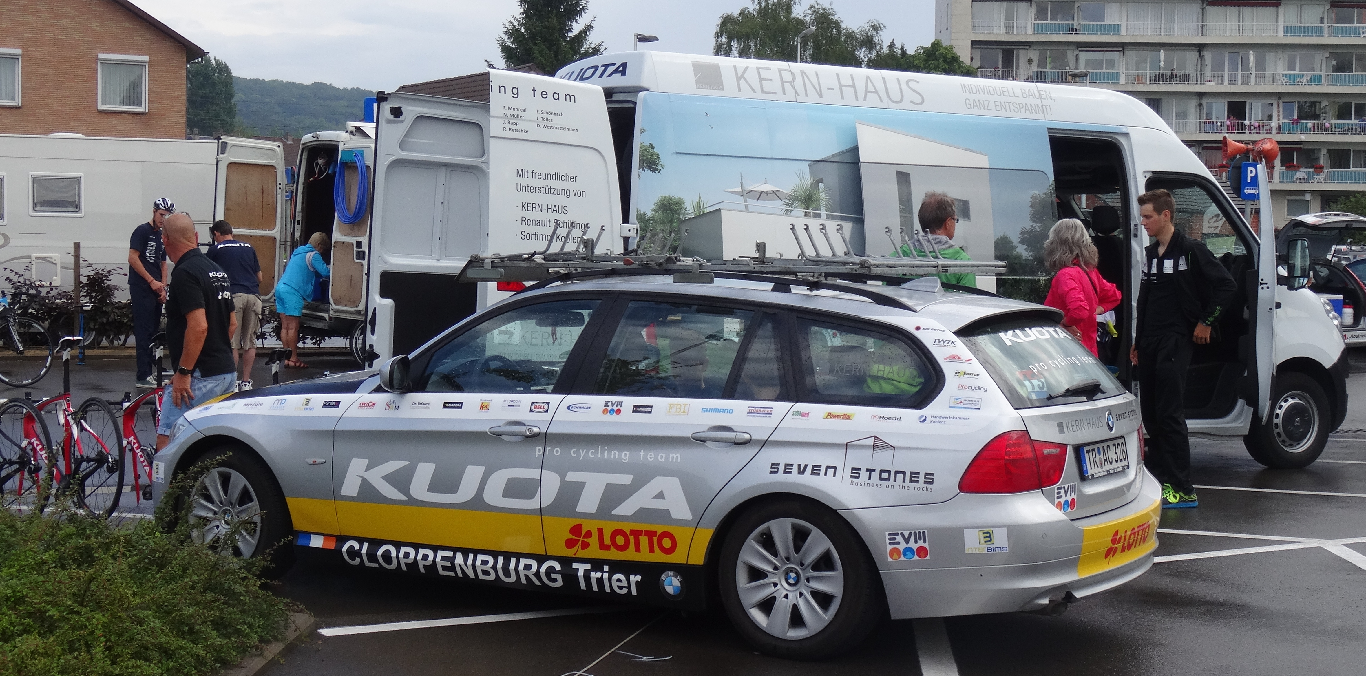 Reportage photographique réalisé le dimanche 8 juin à l'occasion du départ du Mémorial Philippe Van Coningsloo 2014 à Wavre, Belgique.